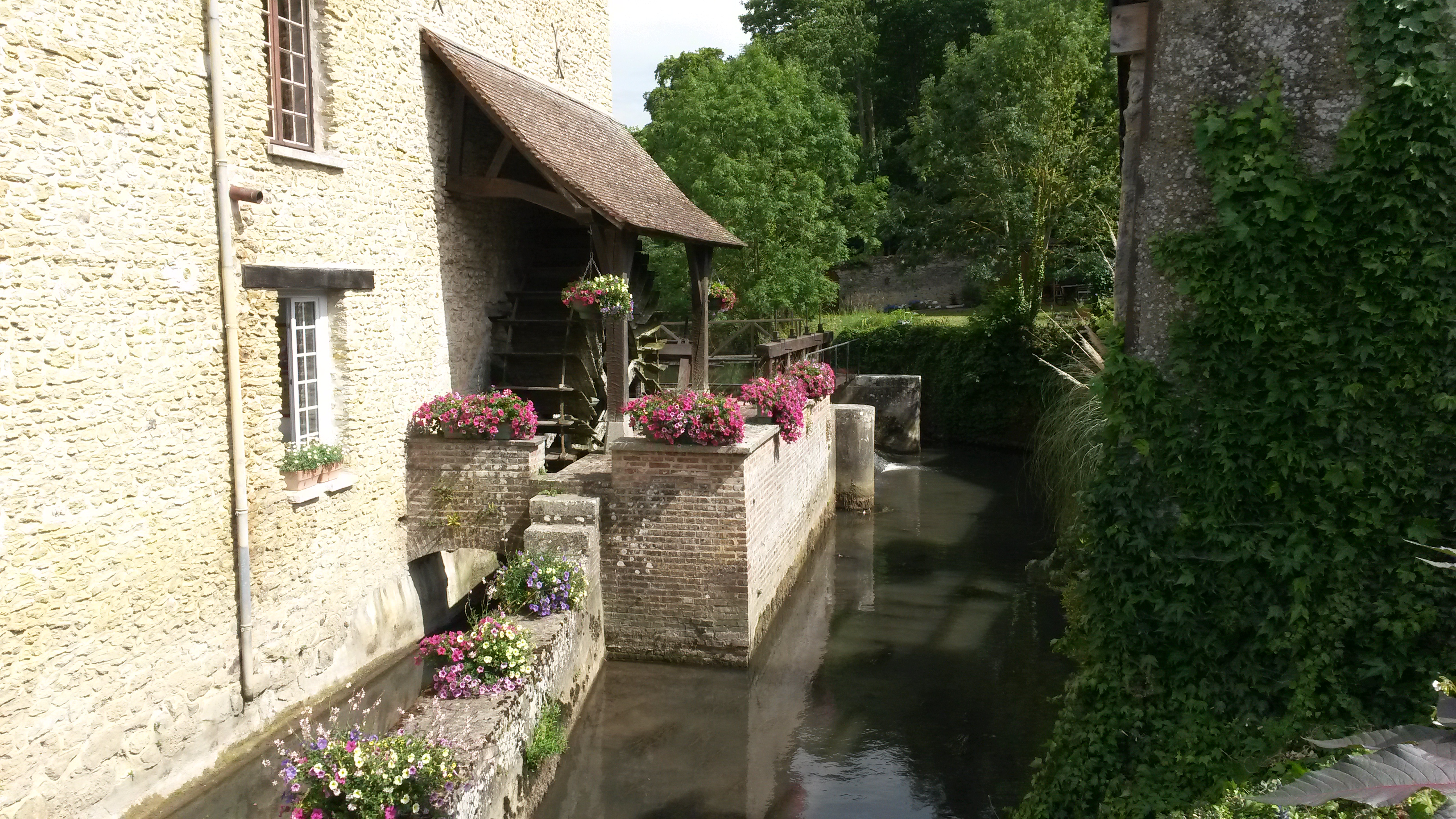 Le Moulin du Bras Sagout, au centre du village, avec sa roue et son vannage (au fond).